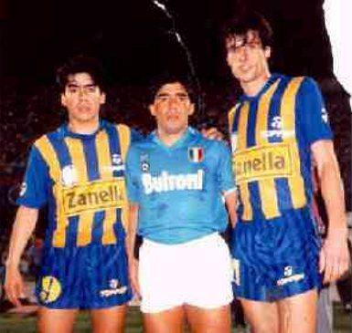 Jorge Díaz, Maradona y Hugo Galloni antes de iniciar el encuentro que enfrentó a Central con Nápoli en Italia, denominado Duelo de Campeones, y que Central venció 1 a 0 con gol de Balbis y con un penal atajado por Alejandro Lanari a Maradona en el final del partido.